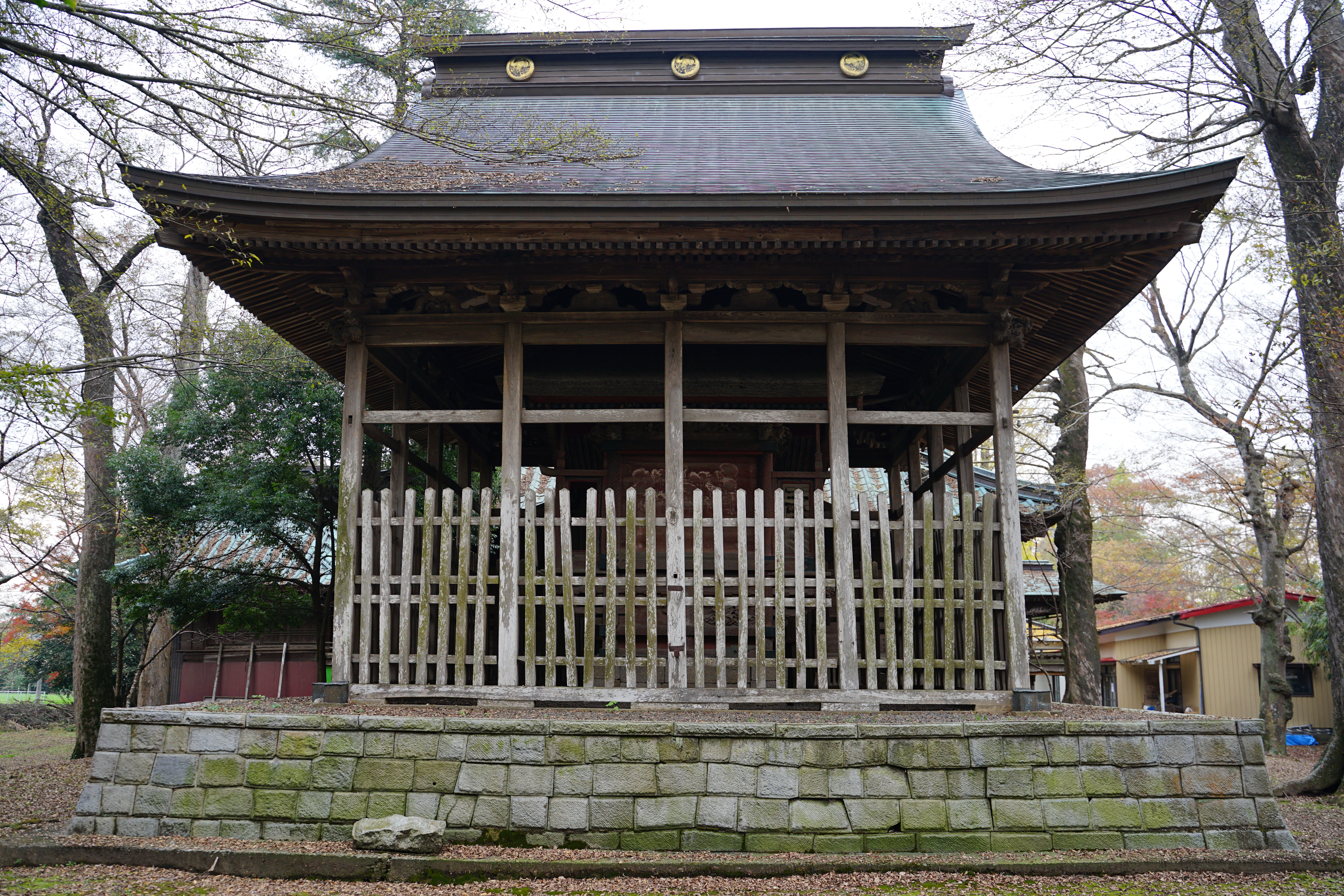 金村別雷神社の本殿（茨城県つくば市）